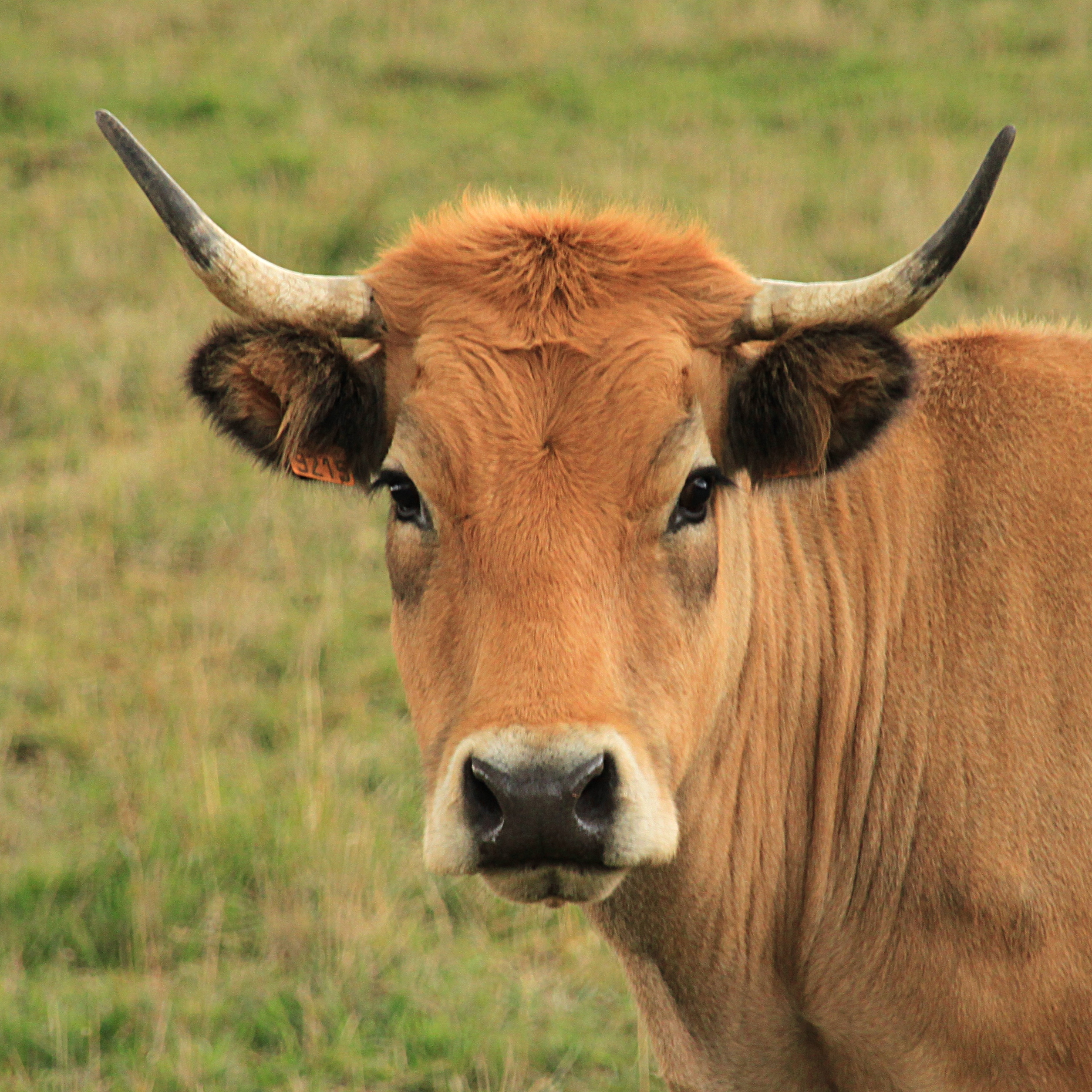 Aubrac de face, Sainte-Marie, Cantal